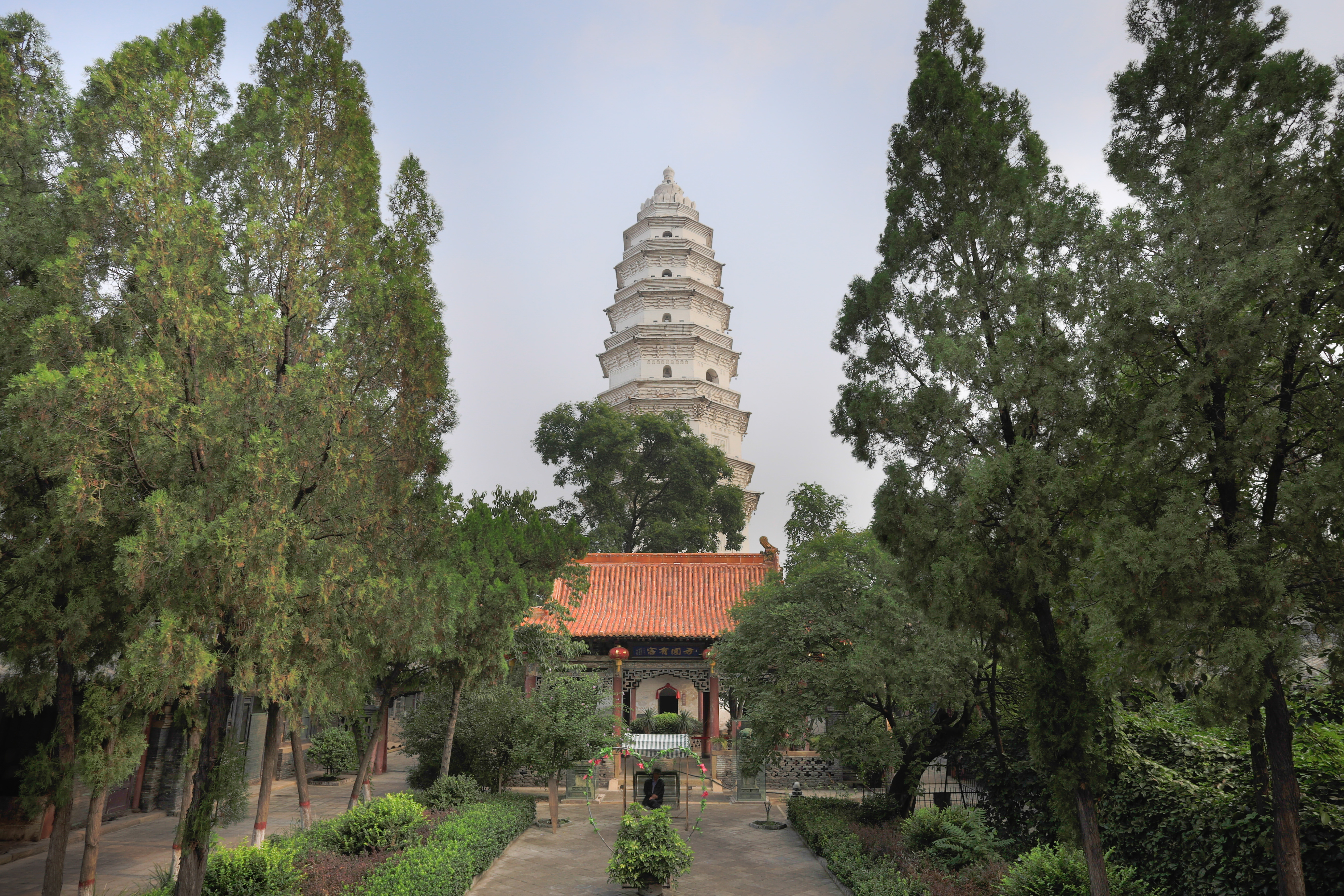 太谷无边寺 —— 山门倒座戏台上看白塔